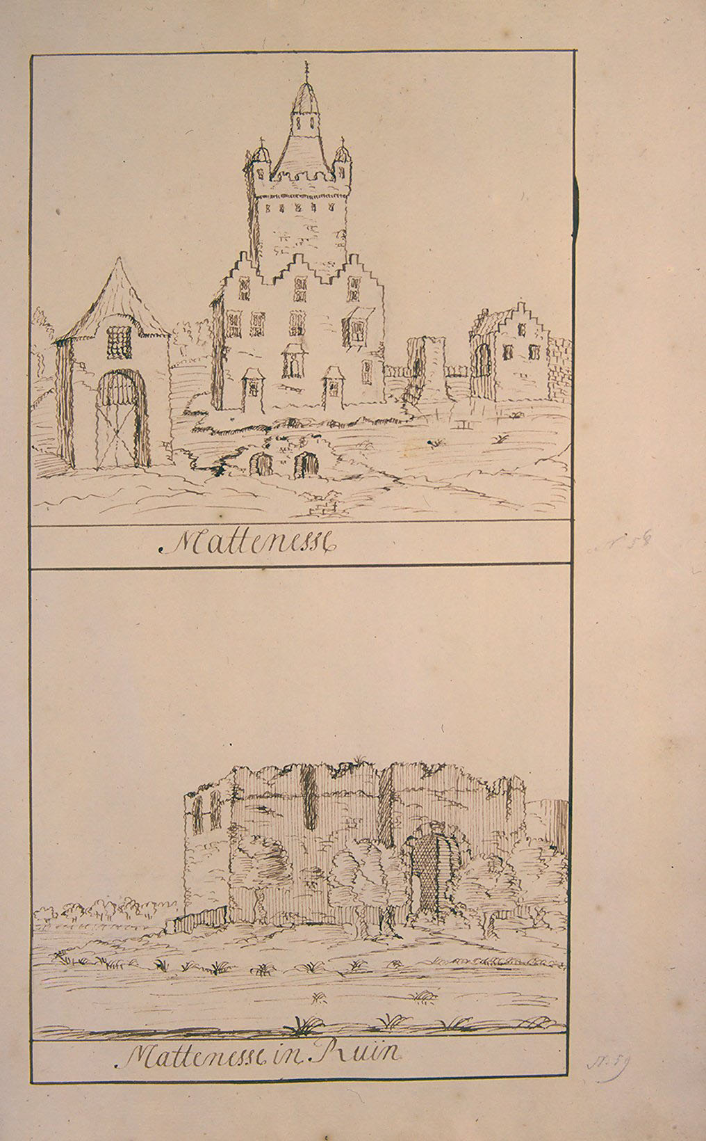 De Kasteelen in het eerste gedeelte van de gezigten van Amsterdam zijn door Gerrit Schoemaker (1692–1736) Alternative namesGerrit SchoemakerDescriptionDutch textile merchant and draughtsmanDate of birth/death16921736Location of birth/deathAmsterdamAmsterdamWork periodAmsterdamAuthority control : Q30303228 VIAF: 37300258 RKD: 363207 geteekend, de overige gezigten van Amsterdam zijn door diens vader Andries Schoemaker geteekend en een paar naar Cornelis Pronk